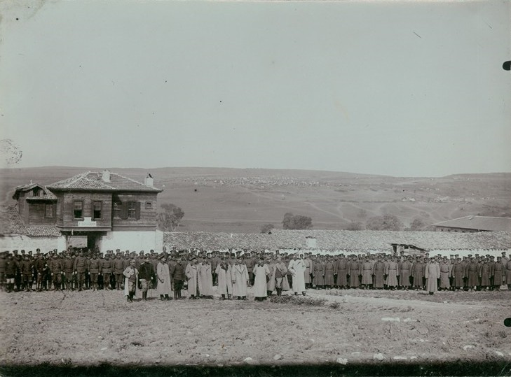 Български офицери и войници, строени пред щаба на Девета пехотна плевенска дивизия при Чаталджанските позиции.